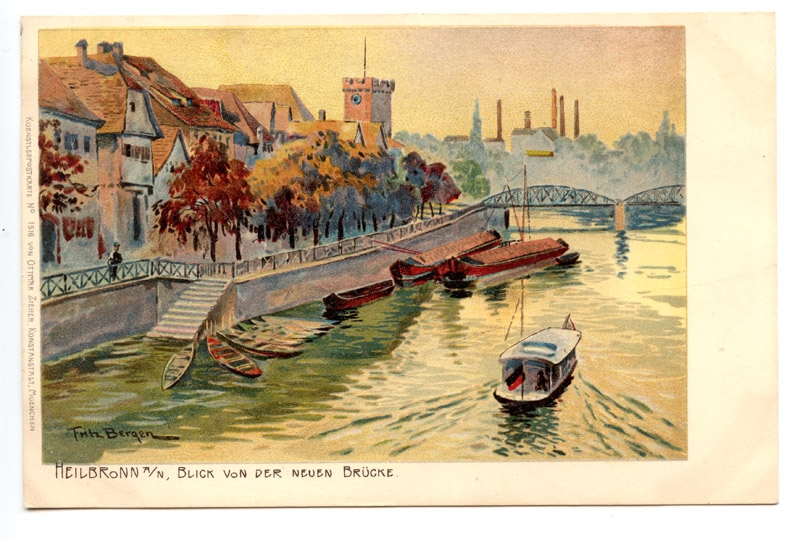 Blick von der neuen Brücke auf die Heilbronner Neckarfront mit dem Eisernen Steg. Im Hintergrund der Rosenberg mit der Zuckerfabrik (Künstlerpostkarte 1518 verlegt von Ottmar Zieher, München).